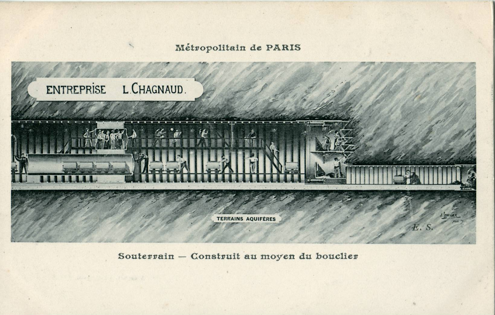 Carte postale ancienne éditée par ES Métropolitain de Paris : Souterrain - construit au moyen du bouclier (entreprise L. Chagnaud)